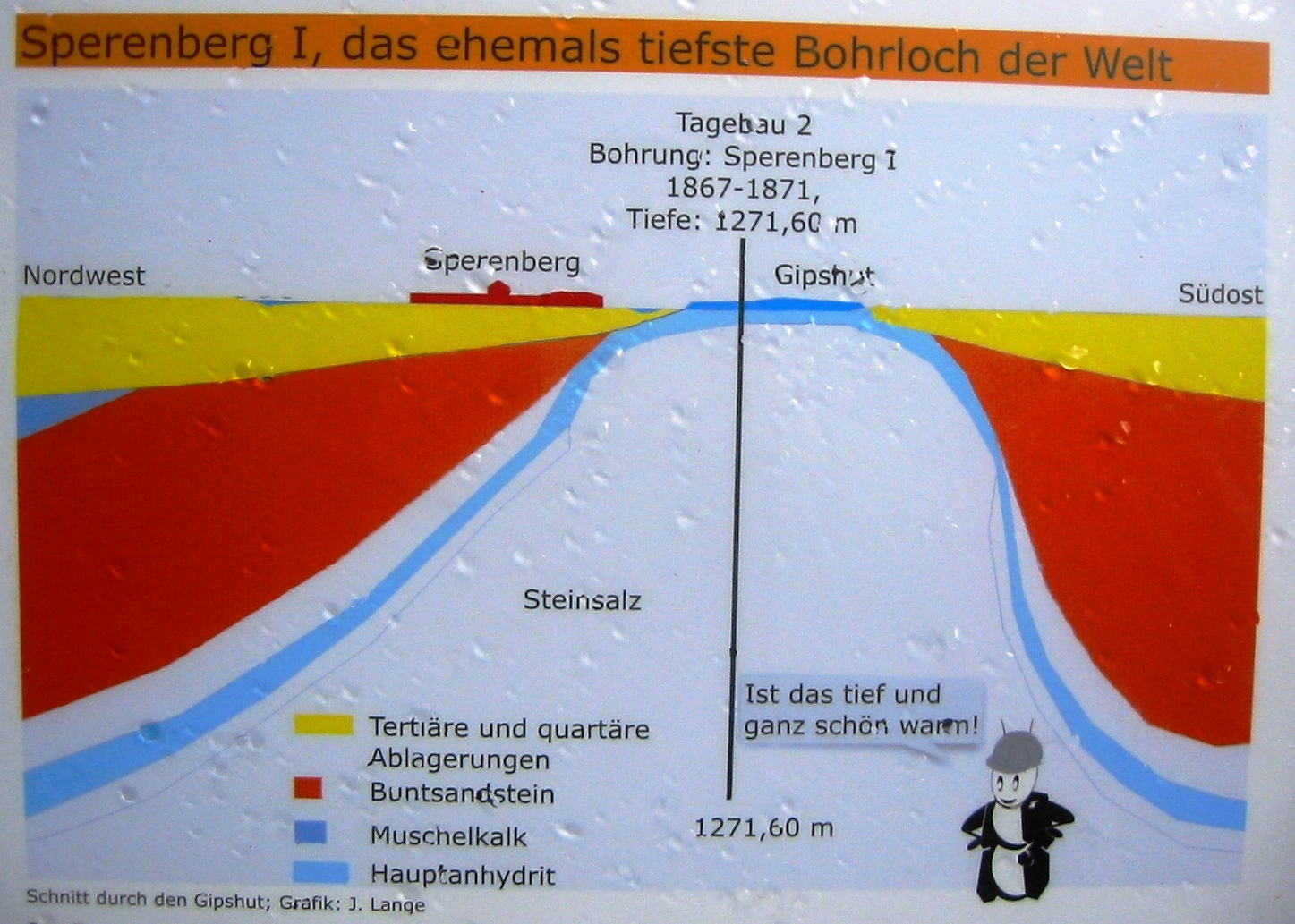 Schematischer Aufbau des Gipshutes, Gemeinde Am Mellensee, Landkreis Teltow-Fläming, Brandenburg. Teilaufnahme einer öffentlich zugänglichen Informationstafel am „Boden-Geo-Pfad“ in Sperenberg.